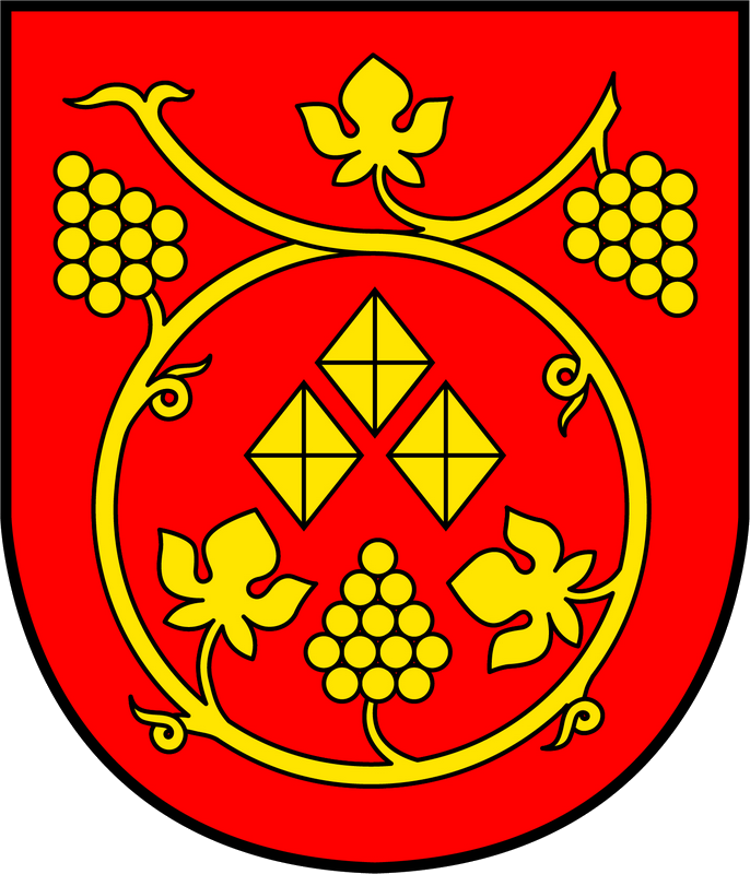 Die Wiederverleihung des Gemeindewappens erfolgte mit Wirkung vom 5. Dezember 2015.